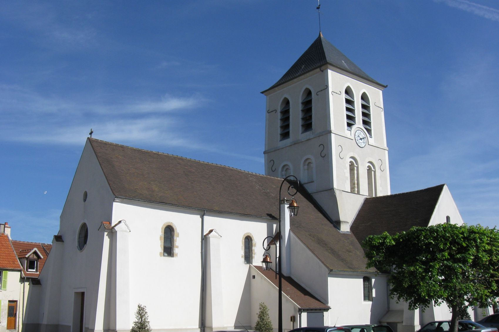 Église Saint-Jean-Baptiste de Saâcy-sur-Marne (Seine-et-Marne, région Île-de-France)